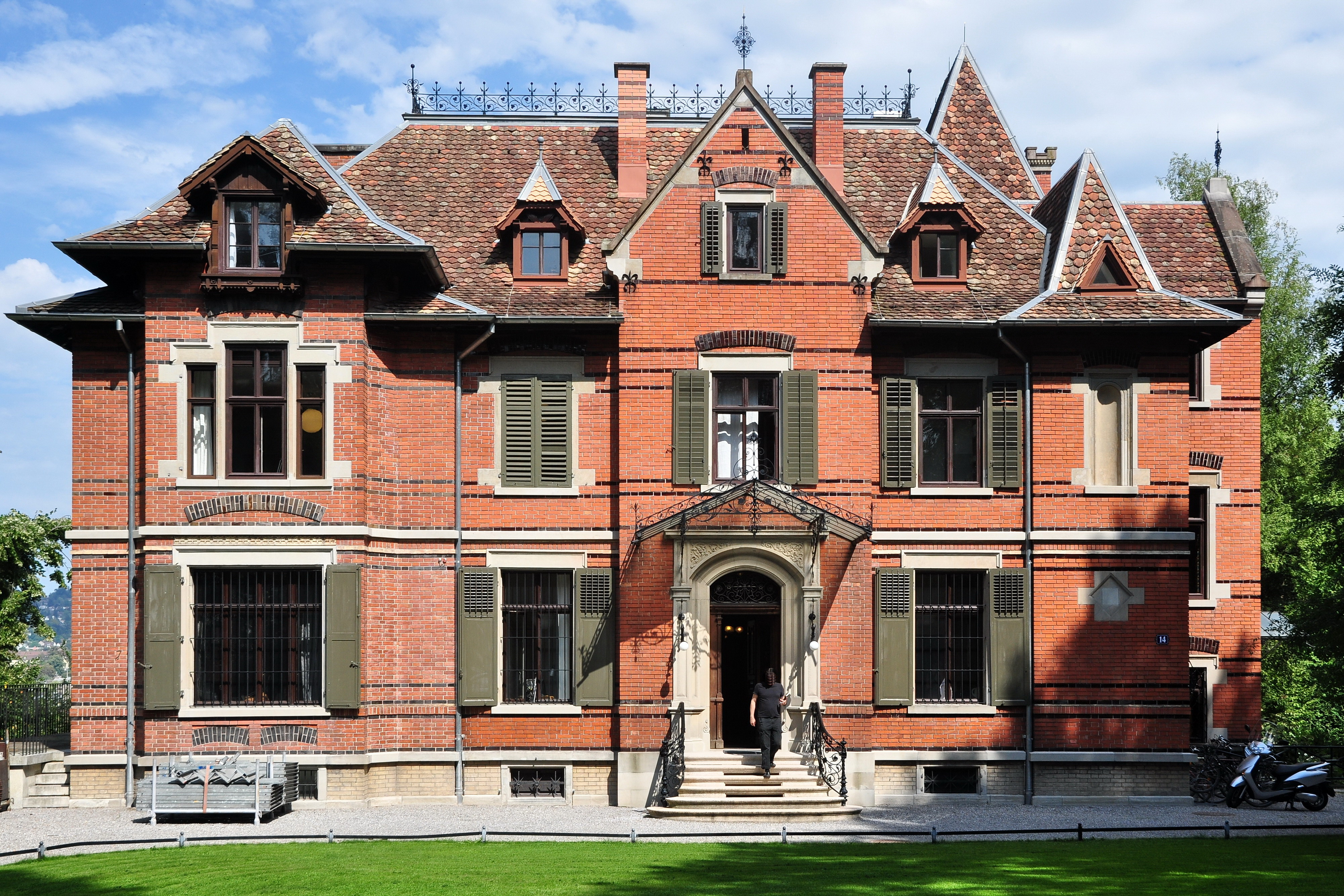 Villa Rieter in Zürich-Enge (Switzerland)